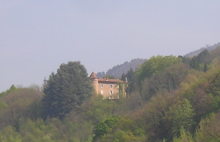 Le château du Mas, à Froges, Isère, AuRA, France. En avril ou mai 2017. Vu depuis Brignoud (Villard-Bonnot).